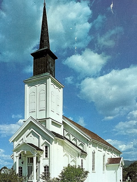 Hønefoss kirke, eldre bilde fra perioden da kirken var hvitmalt